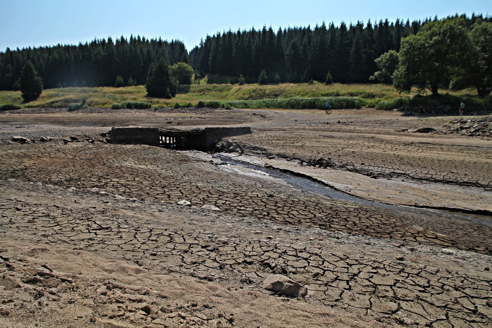 Fláje - nízký stav vody